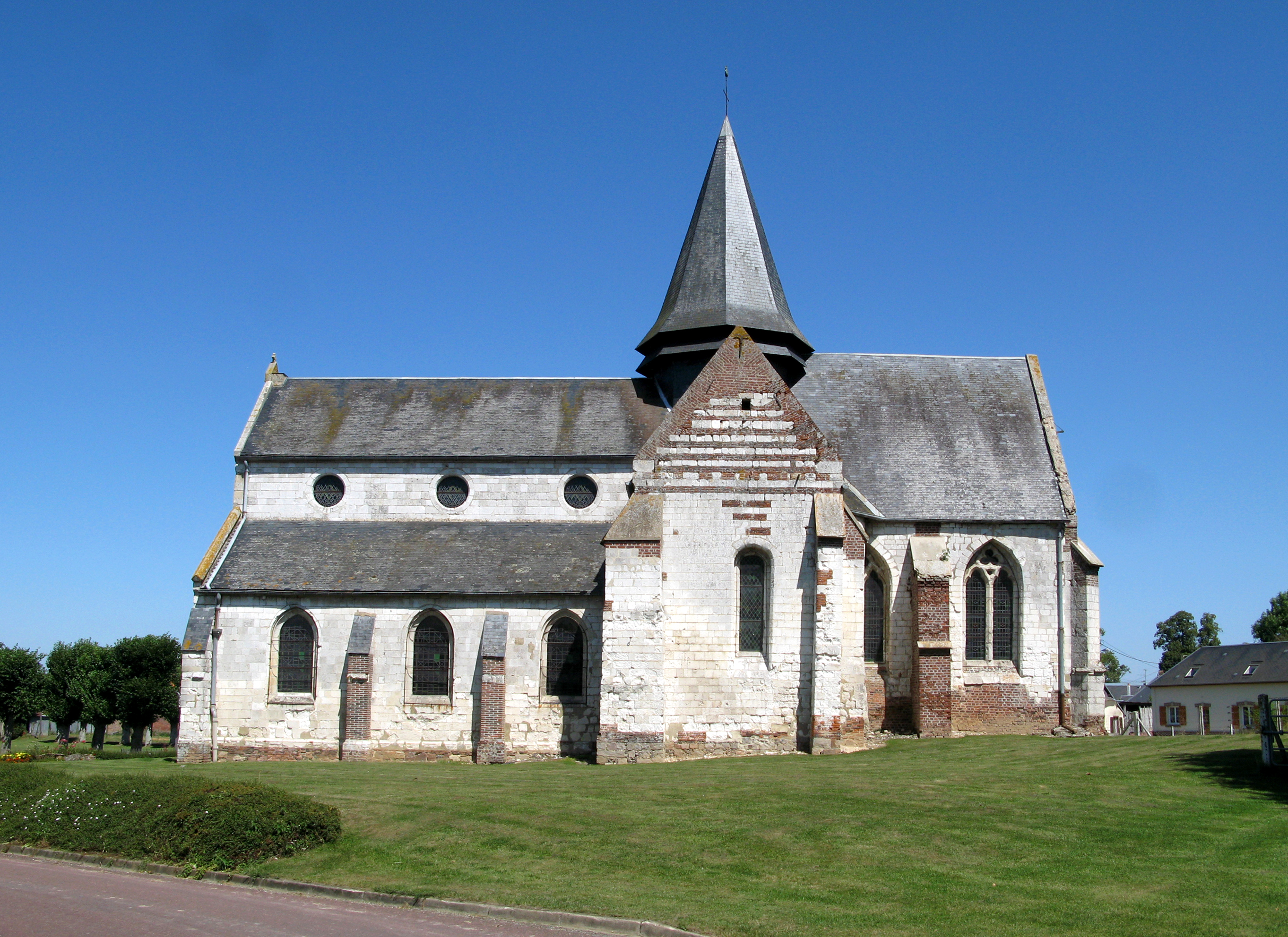 Camps-en-Amiénois (Somme, France) - Façade Sud de l'église Saint-Nicolas. .